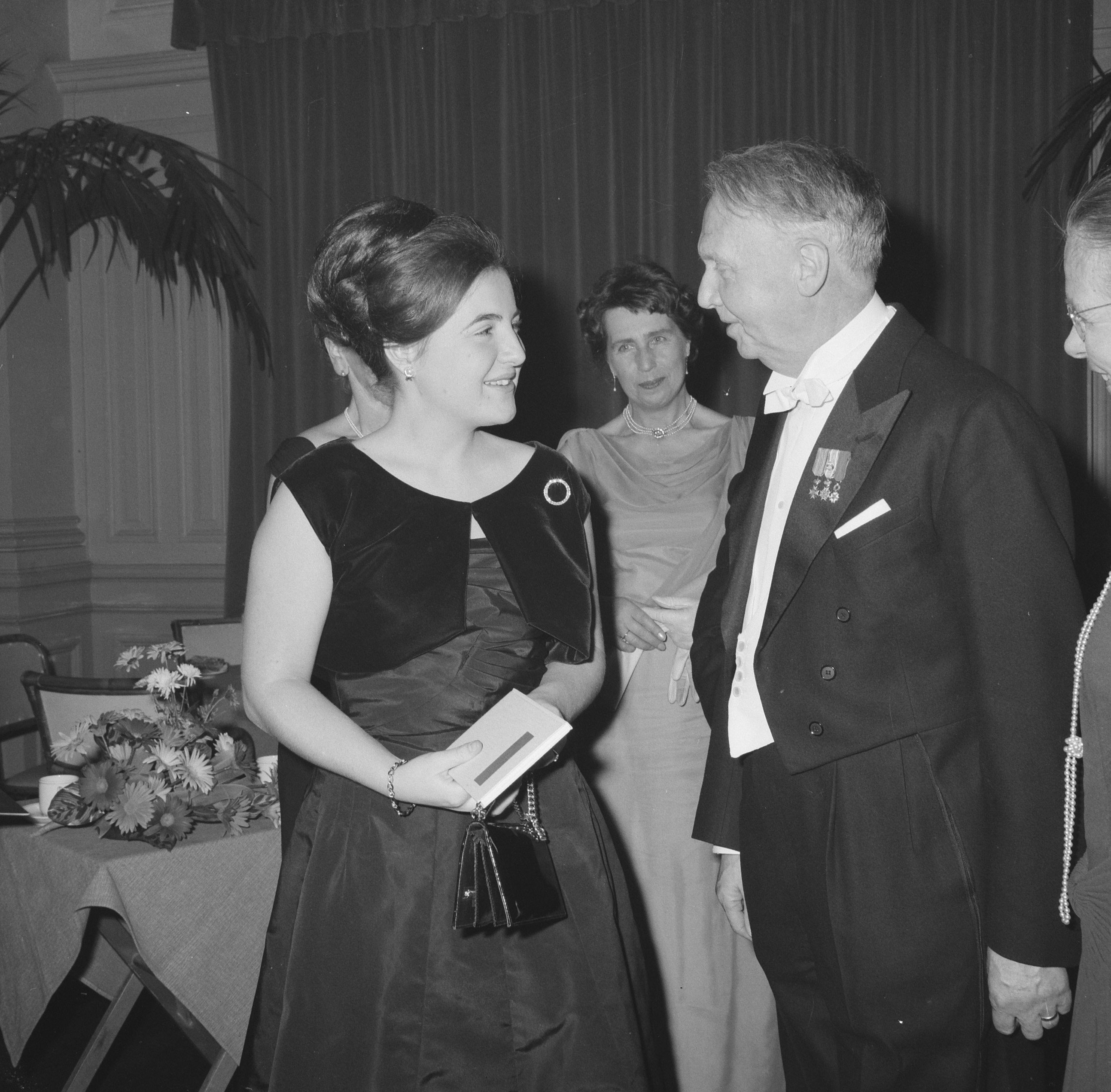 Prinses Margriet jubileumconcert bijgewoond 150-jarig bestaan van het Noordhollands Philharmonisch Orkest te Haarlem. De prinses voorgesteld aan componist professor [Hendrik Andriessen?] 29 november 1963